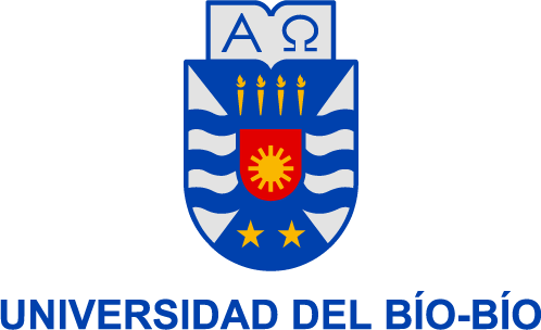 Escudo Universidad del Bío-Bío